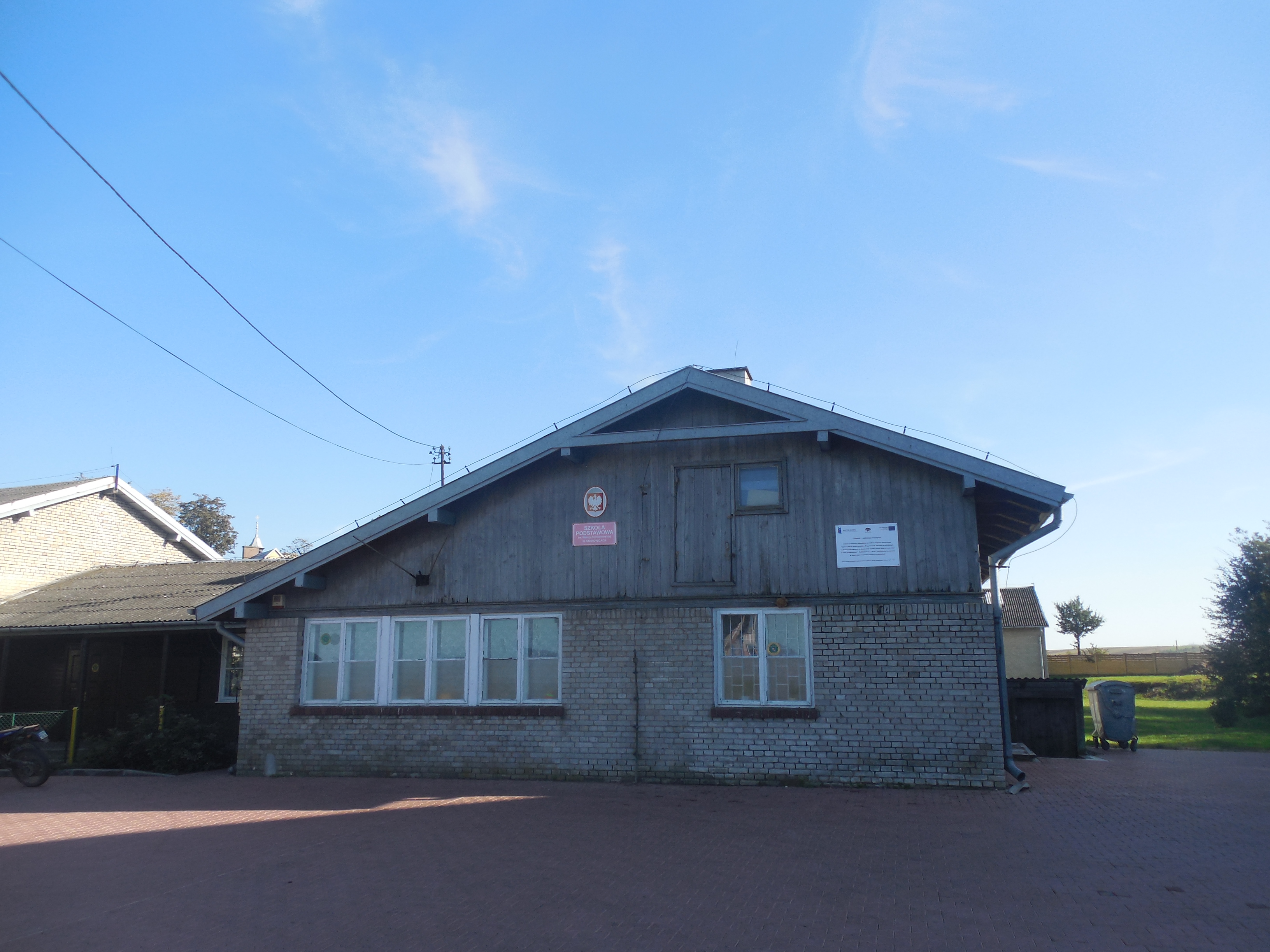 Radkowice-Kolonia, szkoła podstawowa, lata 1946-1947